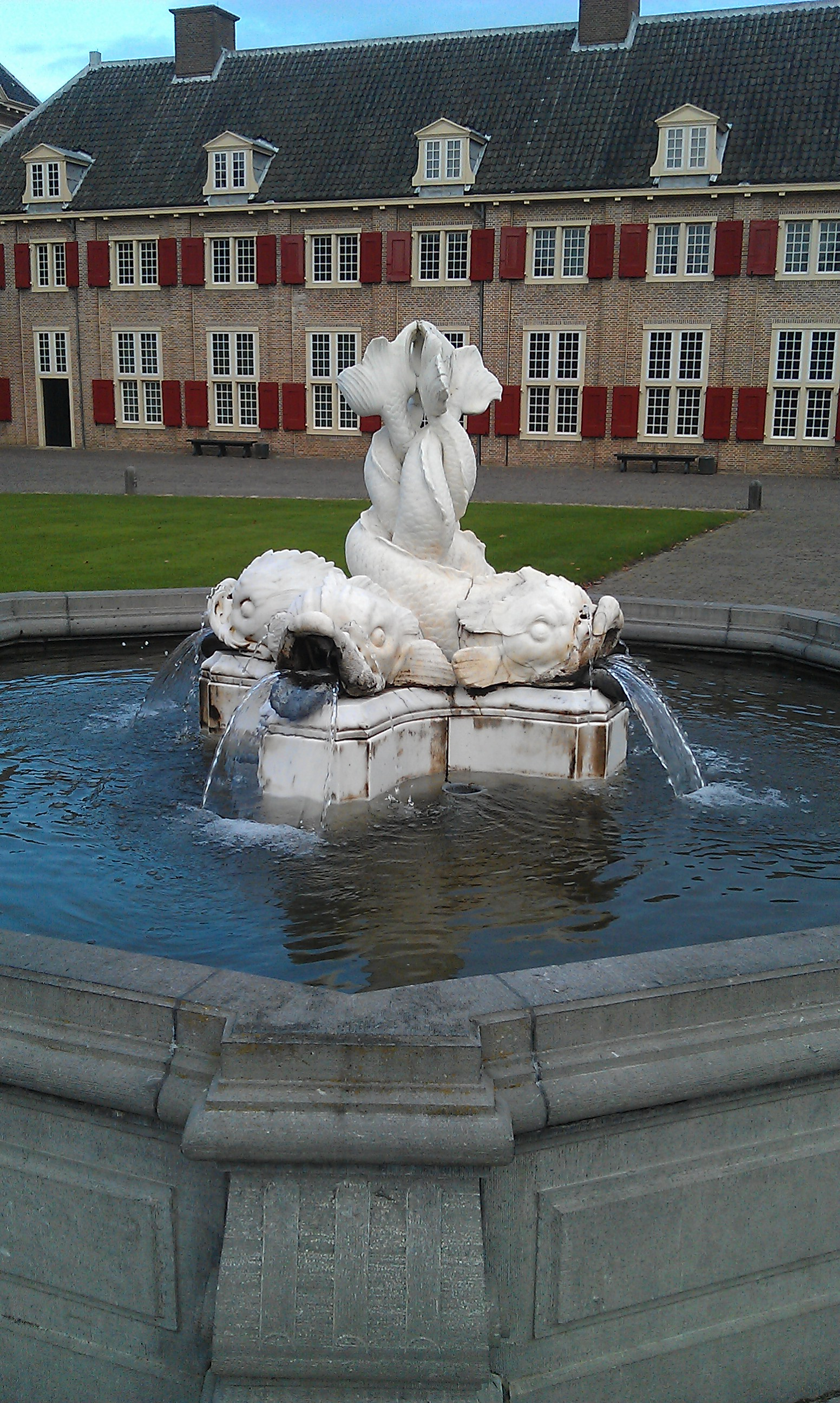 Dolfijnen bij de ingang van paleis het Loo